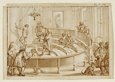 Giampietro Zanotti The Аccademia Clementina Bologna